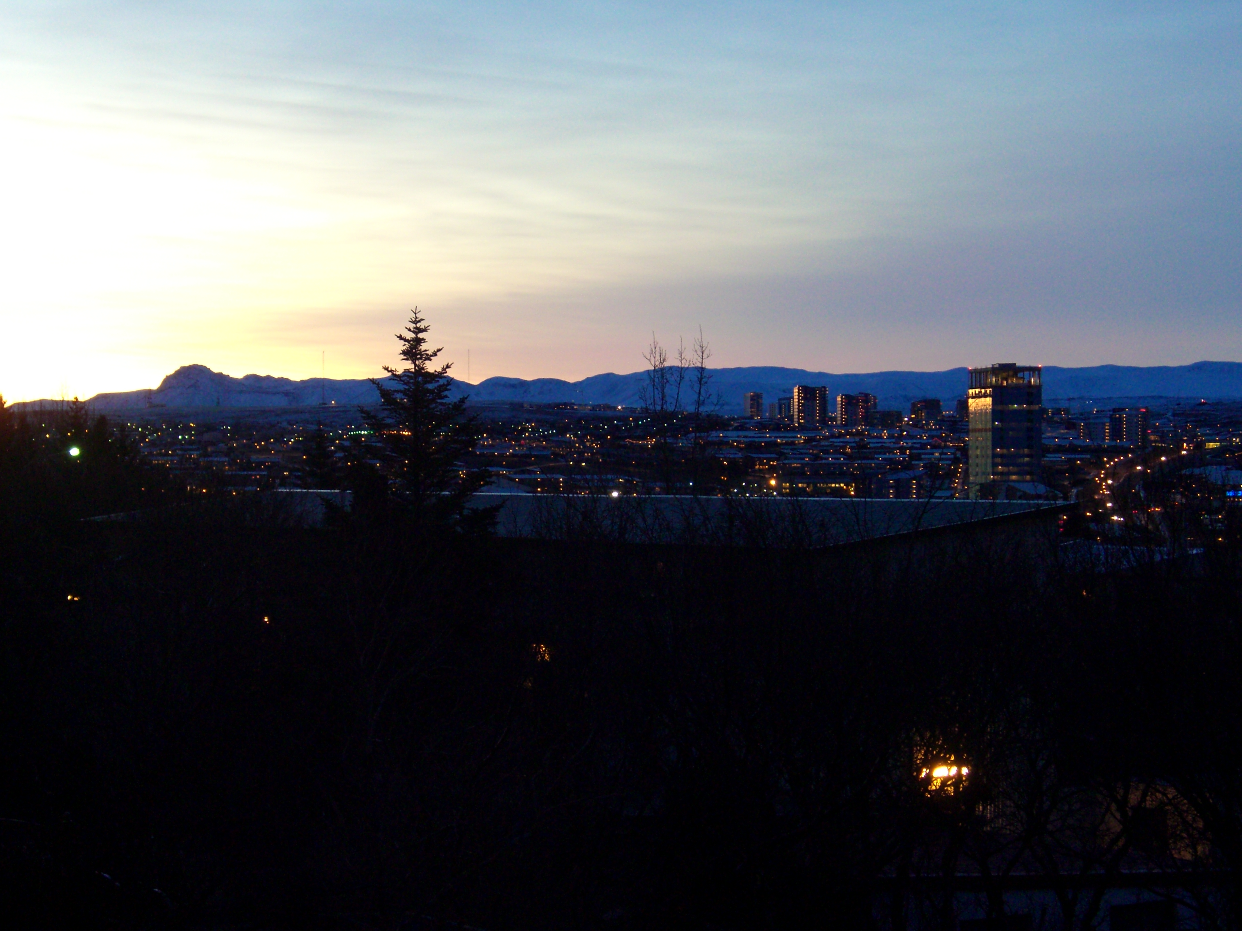 A view of Reykjavik, Iceland.